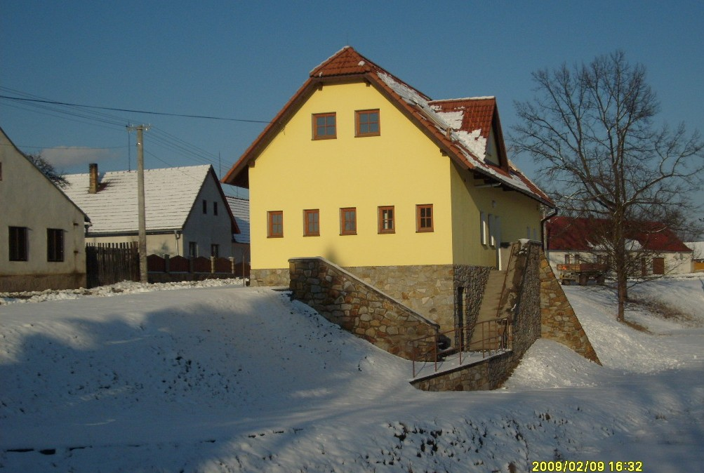 Budova obecního úřadu v Nové Vsi nad Lužnicí.